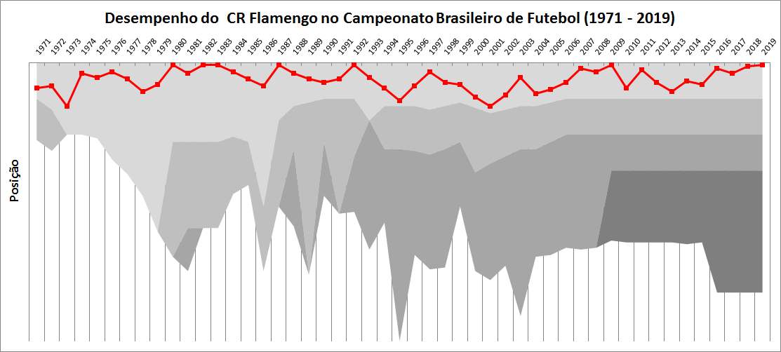 Desempenho do Clube de Regatas do Flamengo no Campeonato Brasileiro de Futebol Masculino entre os anos de 1971 e 2019. Exibindo graficamente a colocação final da equipe no campeonato em cada ano, bem como a quantidade de equipes por divisão.